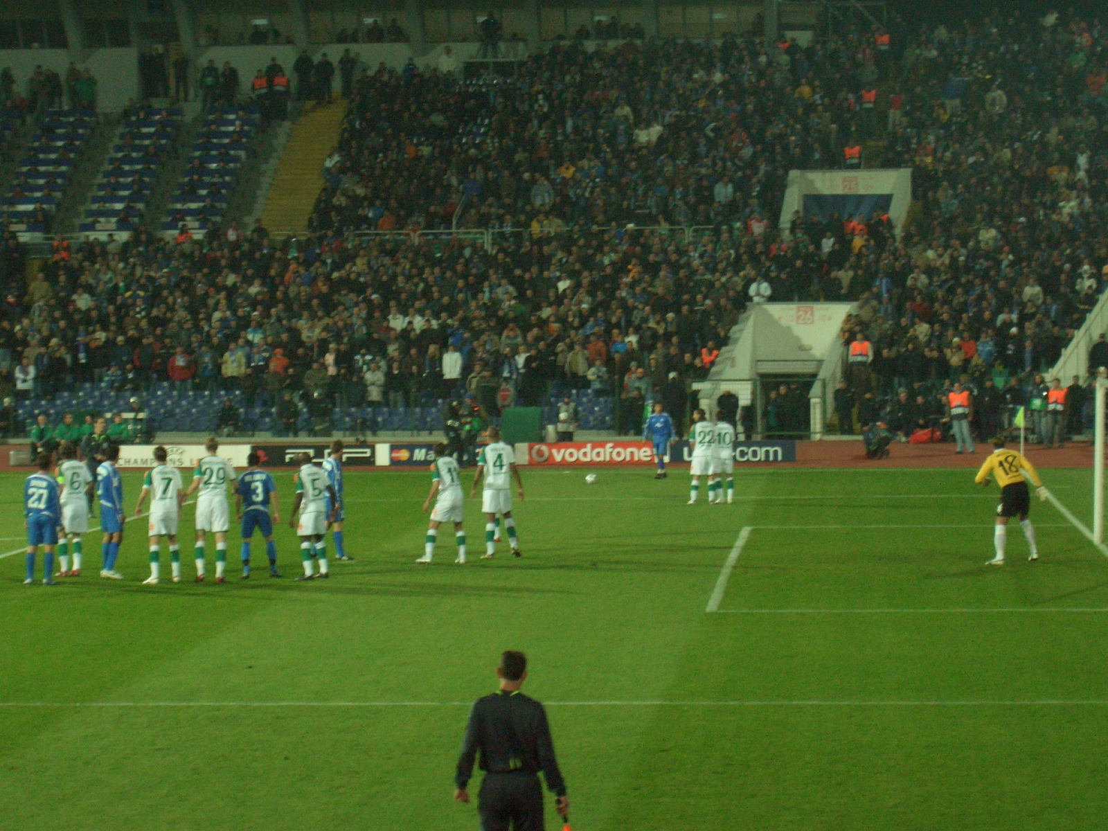 Levski Sofia vs Werder Bremen, UEFA CL 06/07 Group A